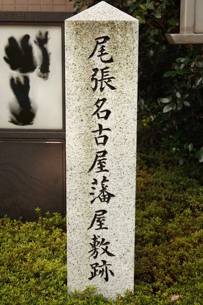 尾張名古屋藩屋敷跡のja:石碑 写真 Hadge撮影 2006年08月17日 東京 Category:史跡の画像 Category:石碑画像 Category:千代田区の画像